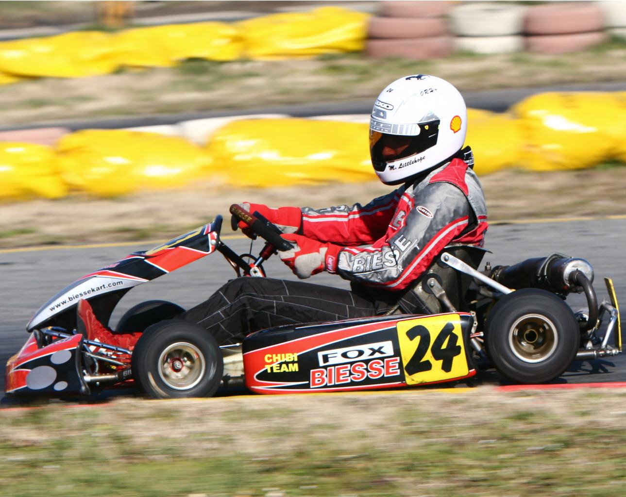 Immagine Kart 100cc Caricata dall'autore.